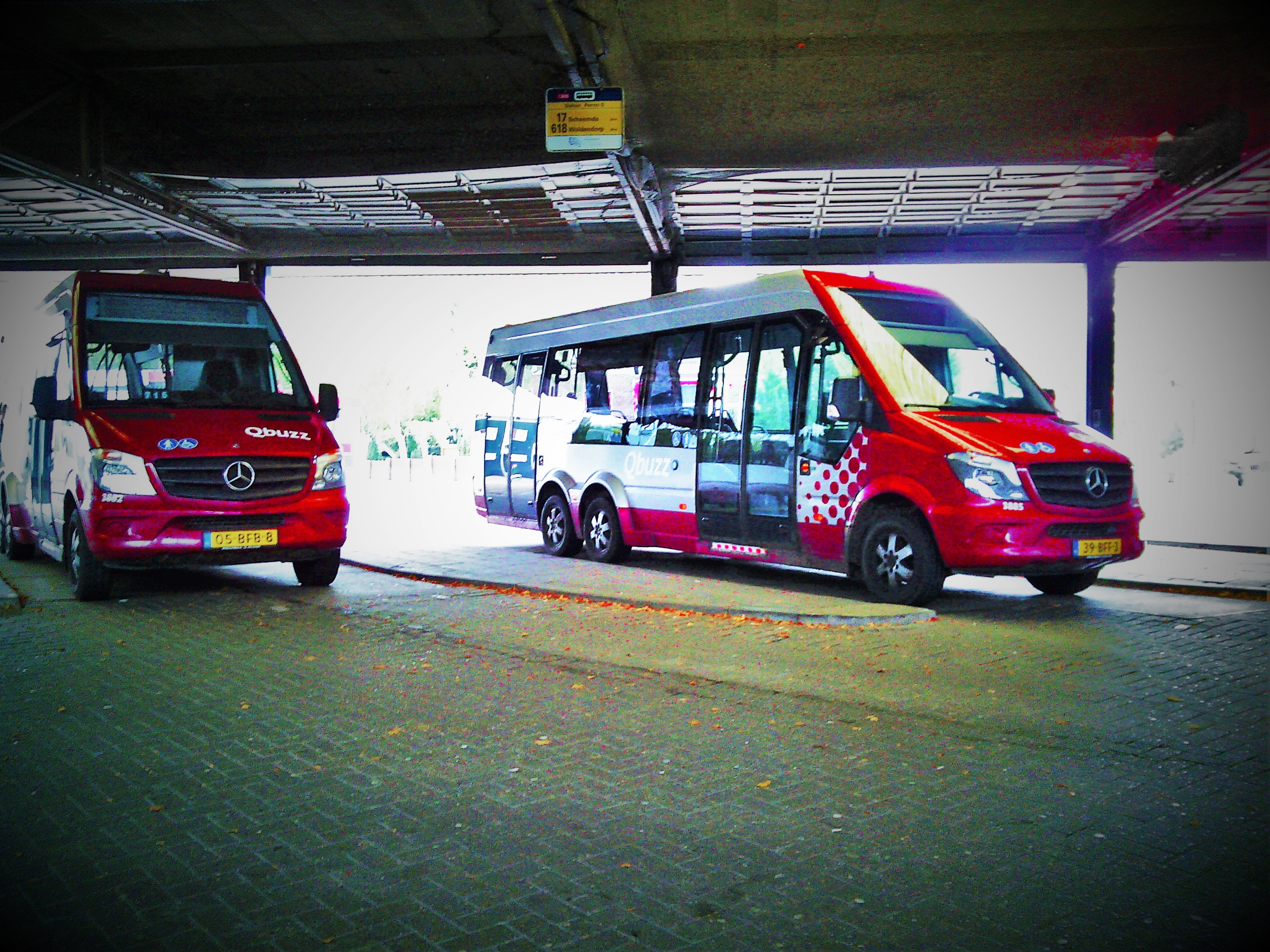 mercedes-benz sprinter city Qbuzz in winschoten.